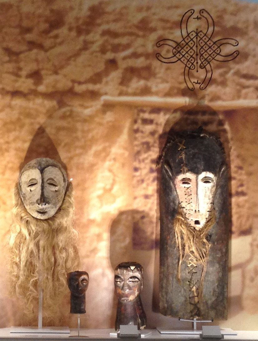 Maschere dell'arte africana tradizionale dell'area Kivu